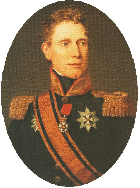 Jonkheer Jan Willem Janssens